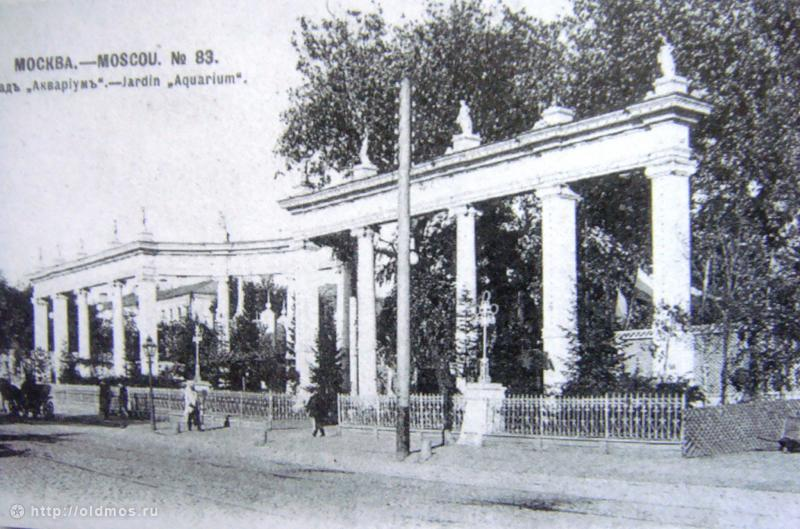 Вход в сад «Аквариум» Триумфальной площади.